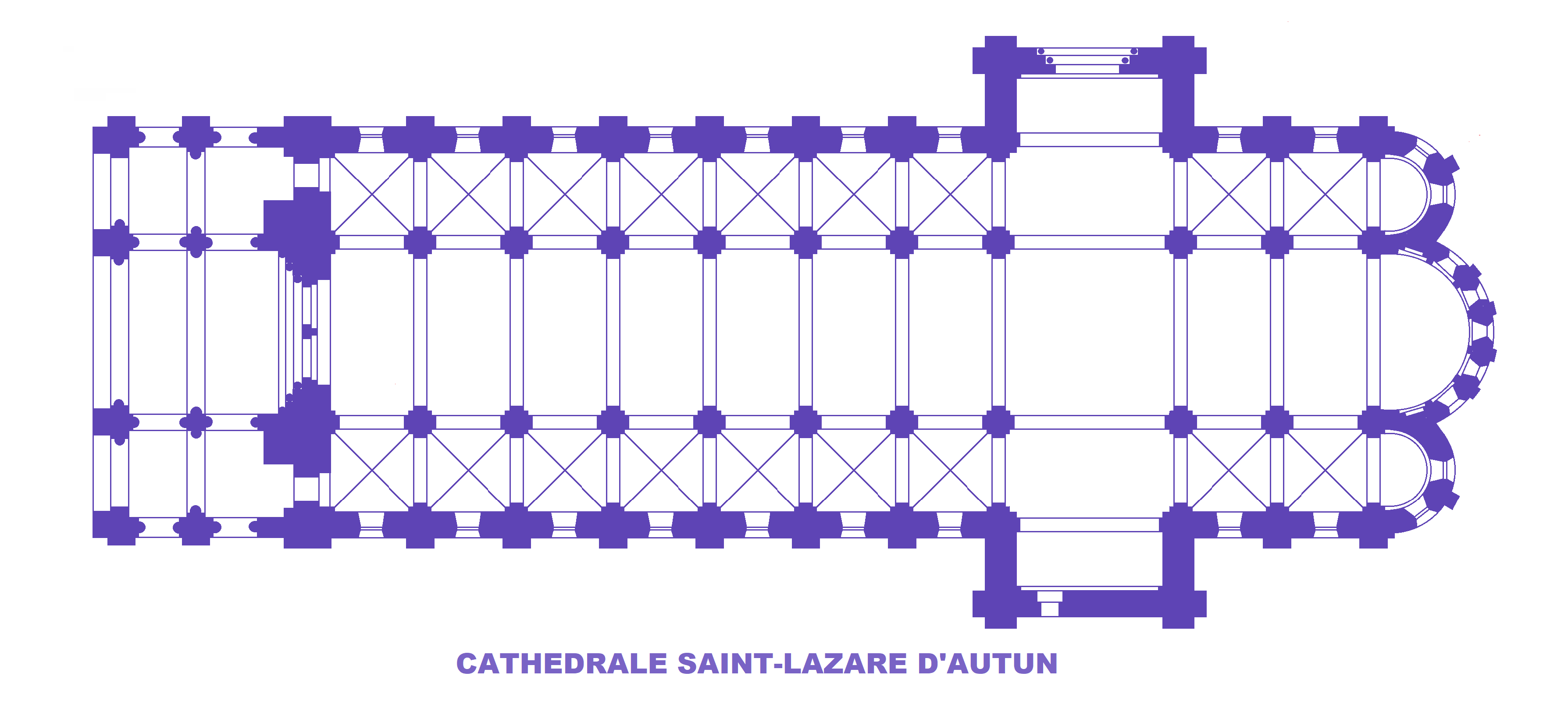 Cathédrale d'Autun, Plan